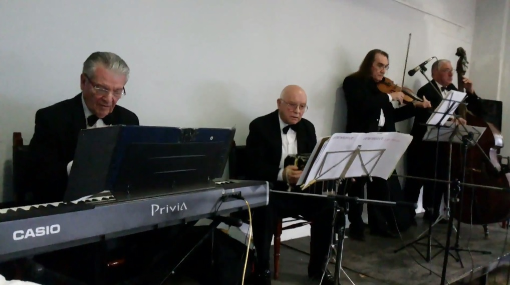 Angela Venturi, 60 años, UTN FRA, Villa Dominico